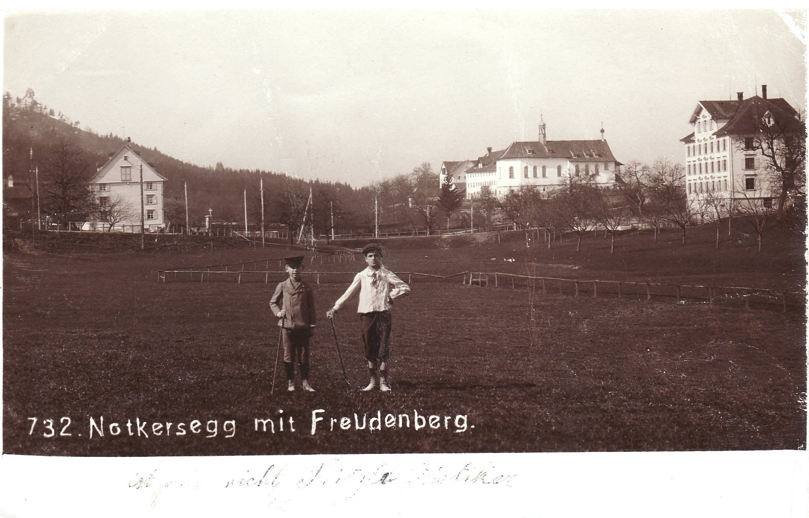 Notkersegg, Kloster Notkersegg mit Pächterhäusern Blick gegen Westen; erbaut 1666, abgebrannt 1718, wiederaufgebaut 1719 Aufnahmedatum 1900 - 1905